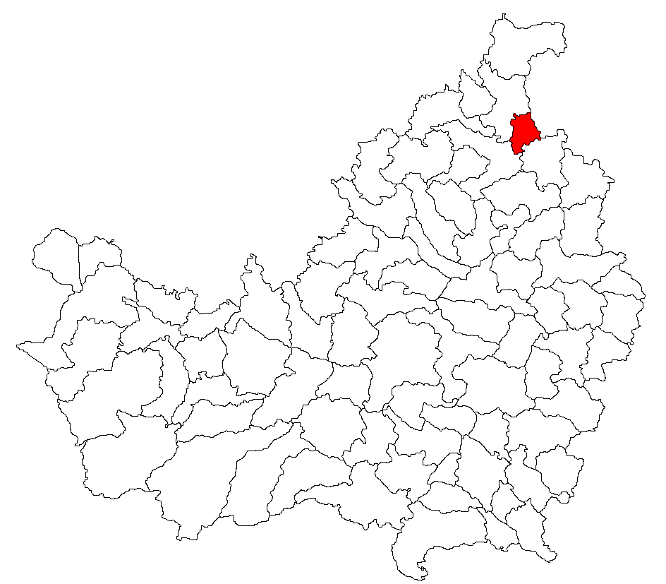 Categorie:Hărţi ale judeţului Cluj